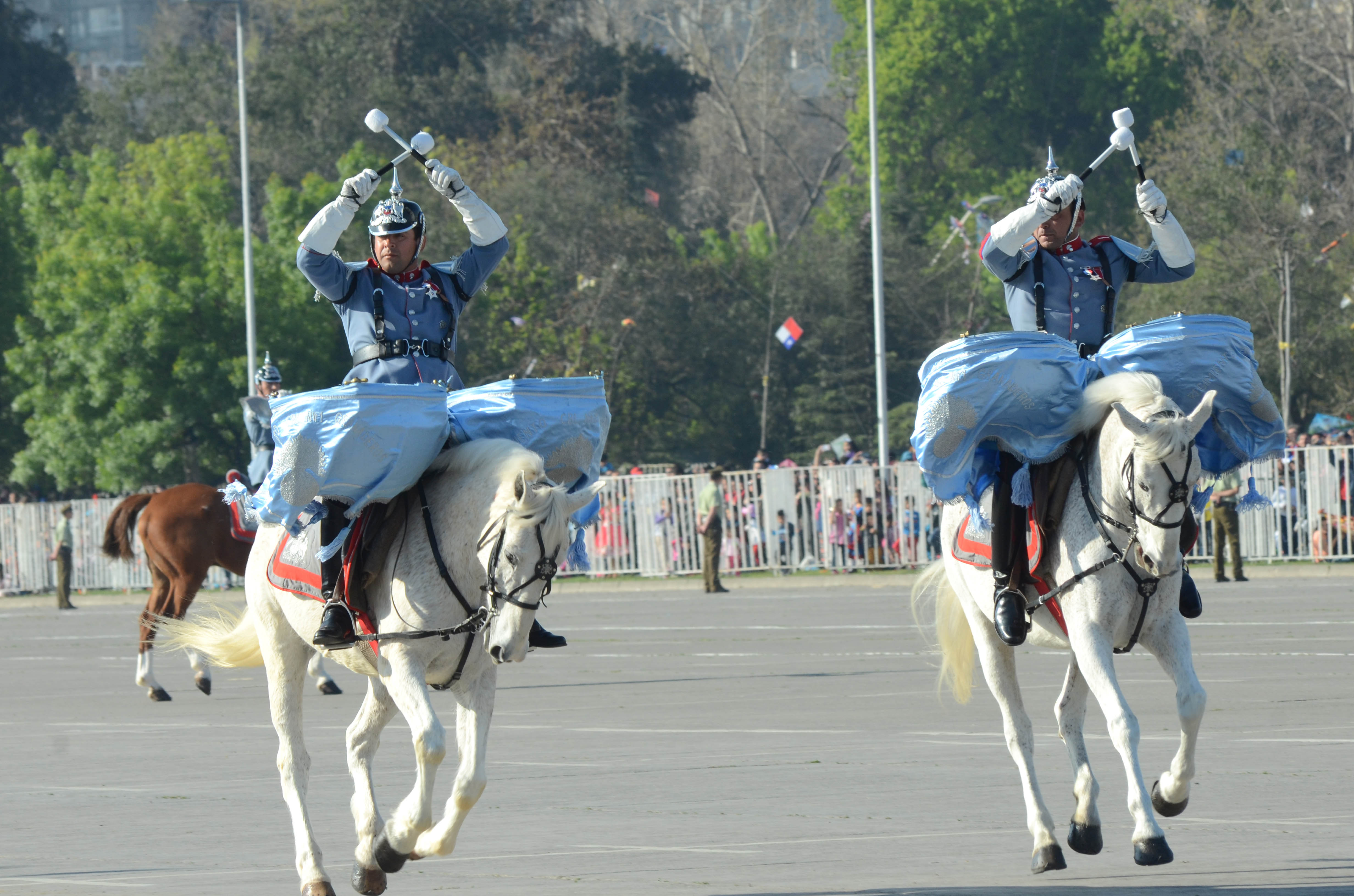 Parada Militar 2014